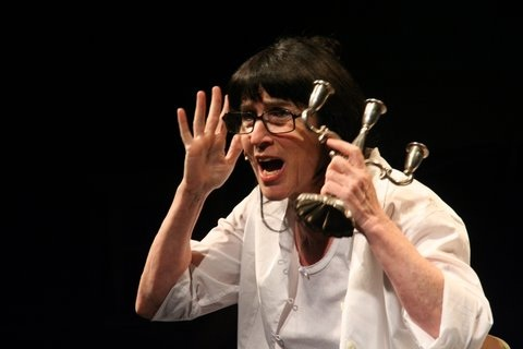 צילום אלדד מאסטרו נעמי יואלי בבין הספירות